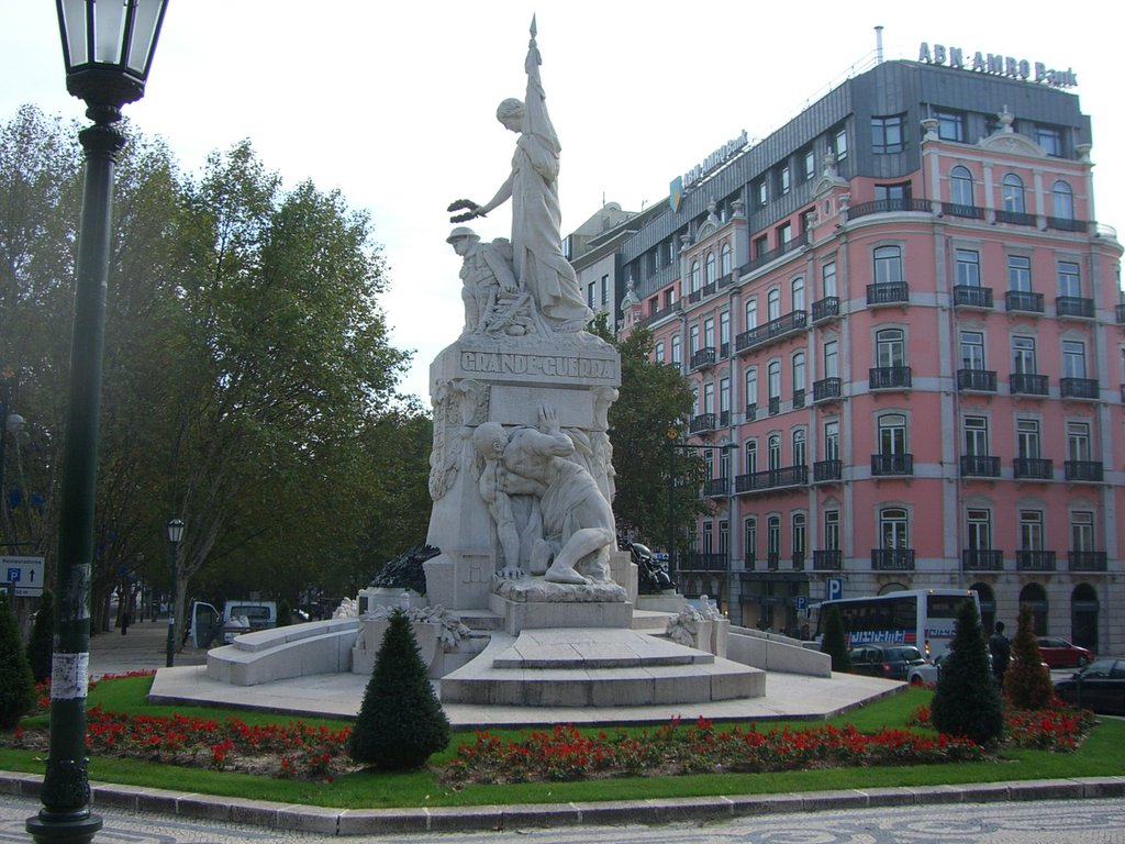 Avenida da Liberdade in Lisbon, Portugal